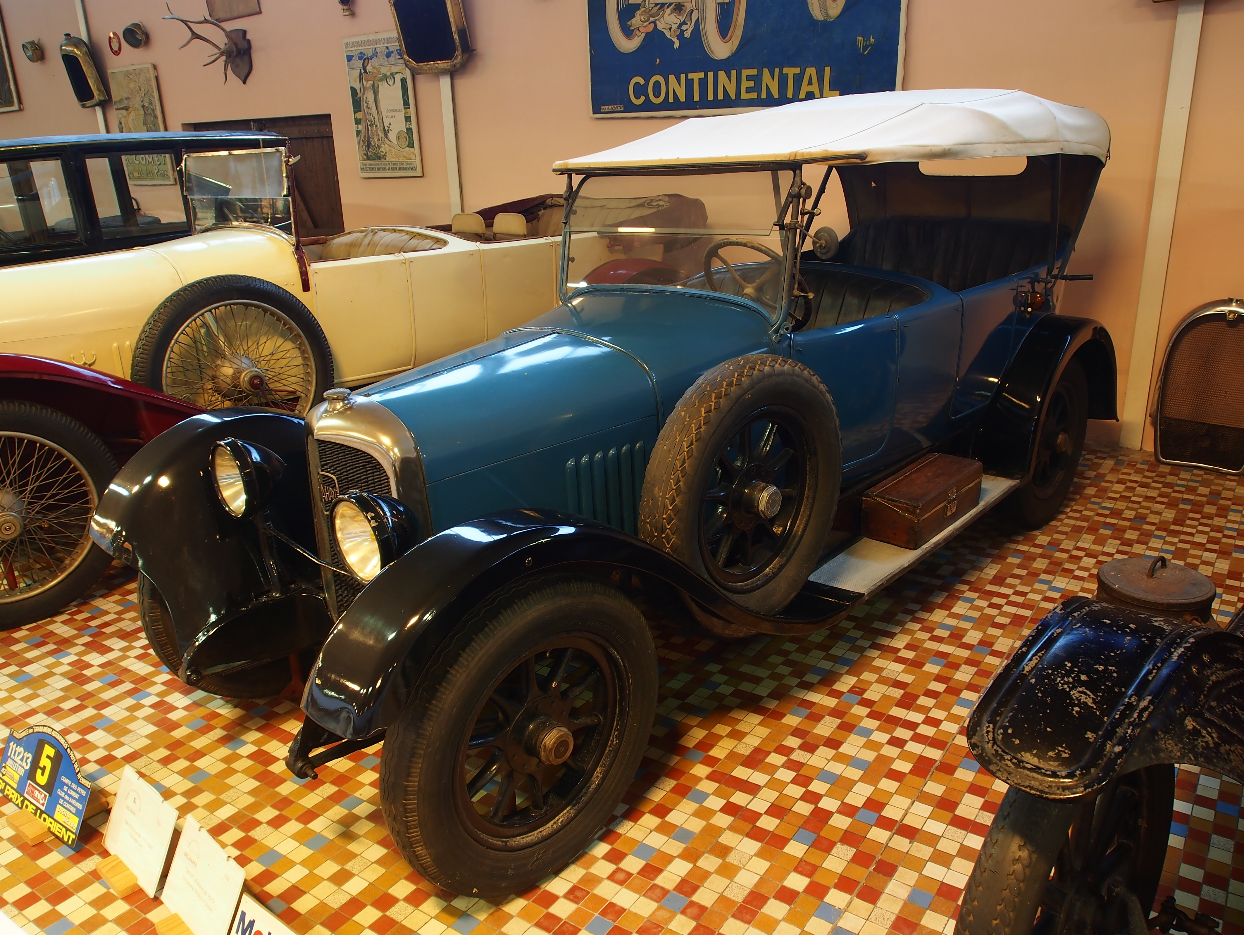 Photographed at the Musée Automobile de Vendée, France.